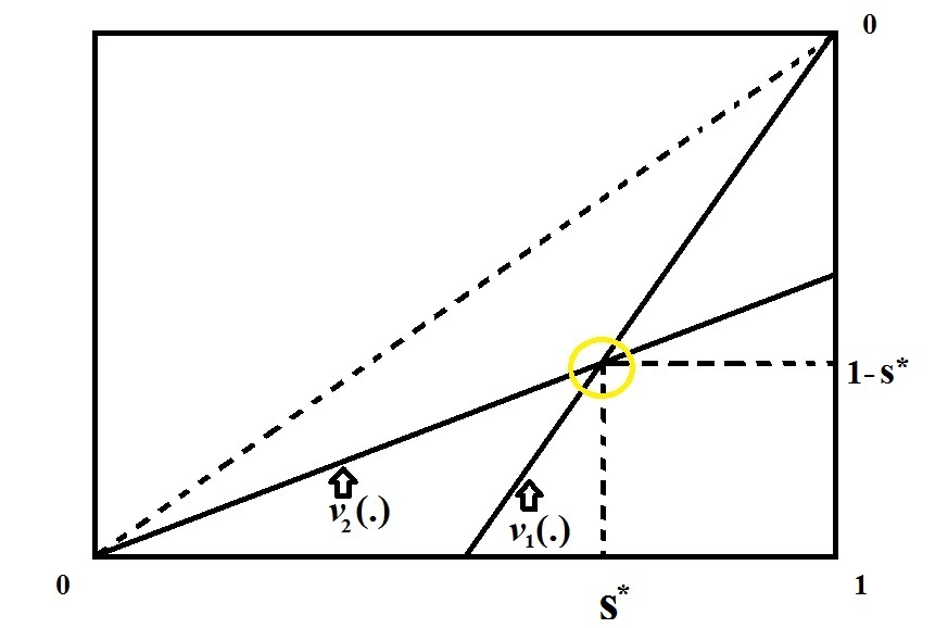 Teilspielperfekter Vertrag im Rubinsteinspiel